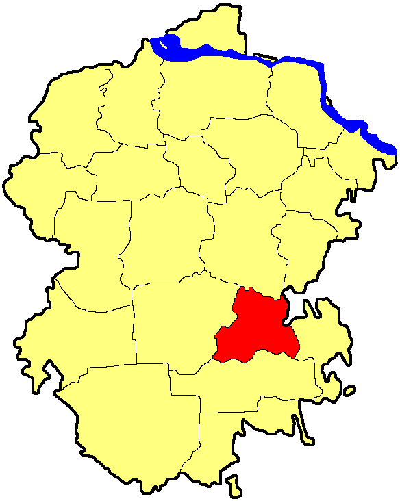 Комсомольський район Чувашії